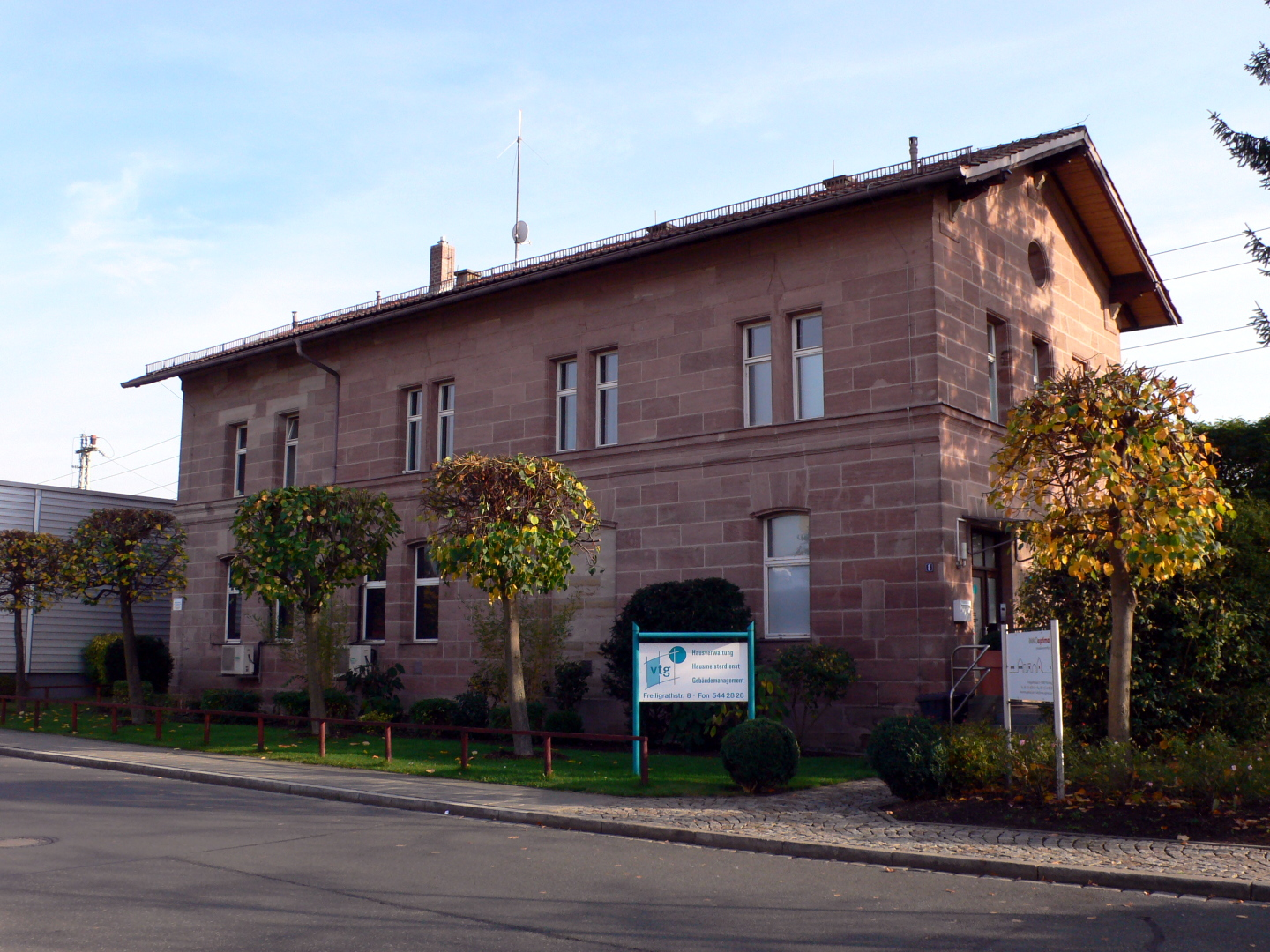 Bahnhof Nürnberg-Mögeldorf, ehemaliges Empfangsgebäude